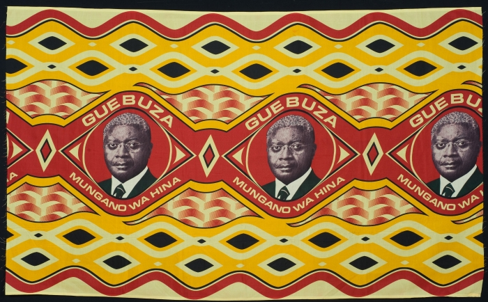 Herinneringsdoek van Armando Emilio Guebuza, president in Mozambique namens de Frelimo partij. Hij werd gekozen in 2004, en herkozen in 2009. Onder zijn portret de tekst Mungano wa hina (muungano wa betekent unie van). Herinneringsdoeken vormen een wijdverspreid maar relatief onbekend fenomeen sinds de jaren van onafhankelijkheidsverklaringen vanaf de jaren '60 in Sub-Sahara Afrika. Ze worden gemaakt en gedragen vanwege een politieke gebeurtenis, zoals de electie van een nieuwe president, een aantal jaar onafhankelijkheid of de komst van een vreemd staatshoofd. Ook andere dan politieke gebeurtenissen worden zo gevierd: de inaugrautie van een kerk, de komst van de Paus, de landing op de maan en de dood van Michael Jackson. De doeken zijn gemaakt om gedragen te worden, vooral door vrouwen, als wikkeldoek om de heupen, of tot kleding vermaakt. Het is gebruikelijk dat grote groepen mensen dan dezelfde stof dragen.